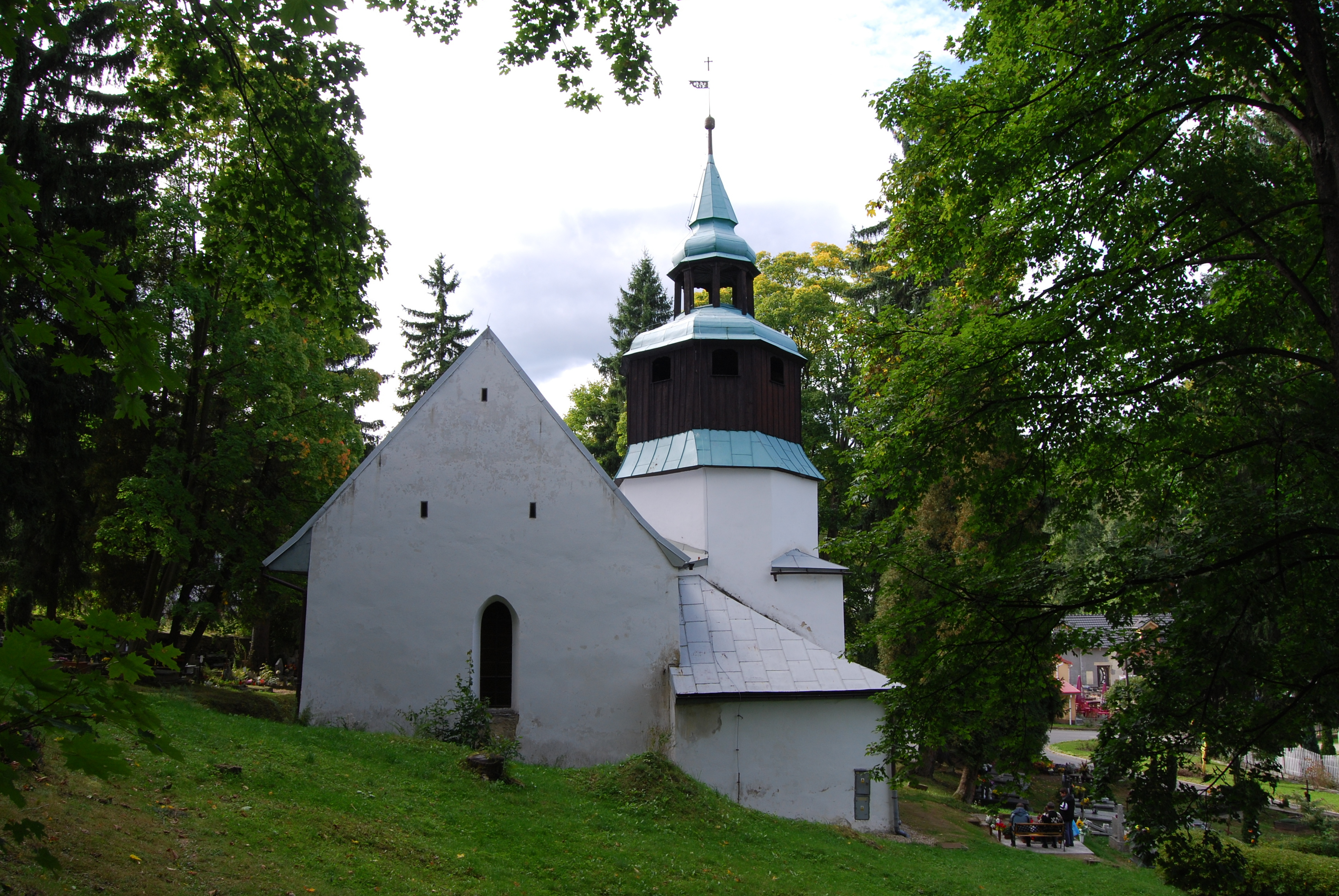 Kościół pomocniczy MB Różańcowej w Szklarskiej Porębie przy ul. Piastowskiej